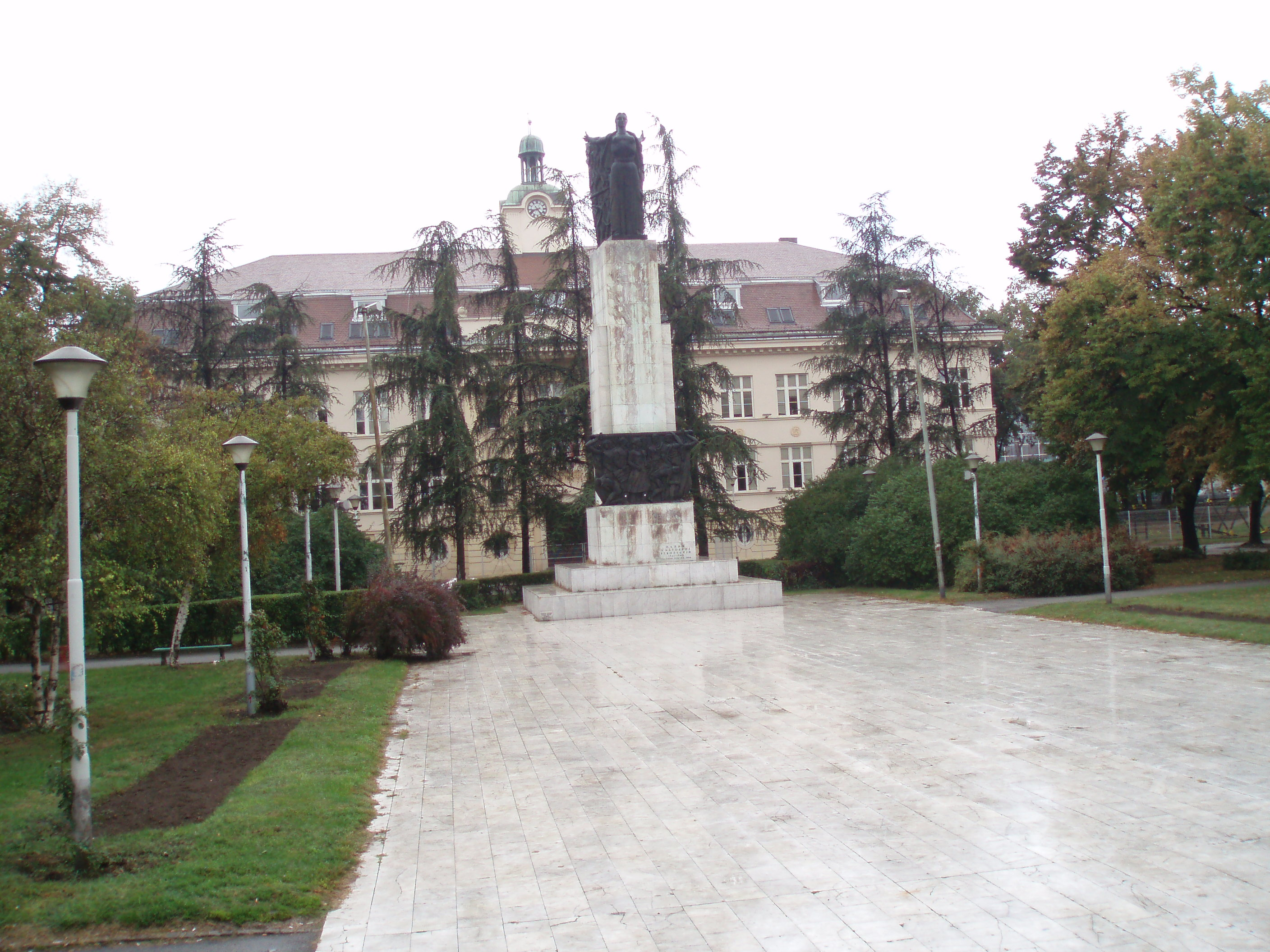 Spomenik u parku na Avijatičarskom trgu u Zemunu, Autor:Nicolo